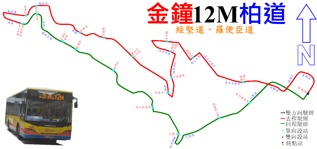 中文（香港）: 城巴12M線的走線圖